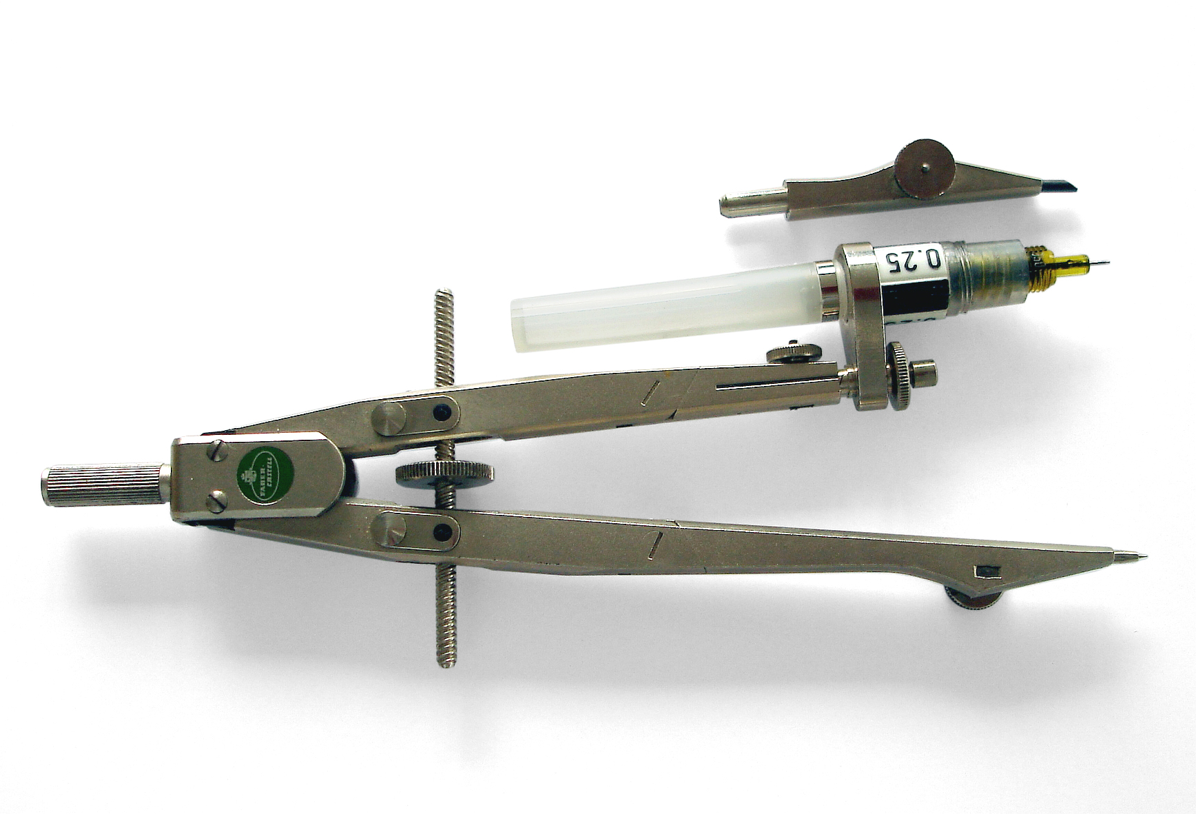 Tuschefüller und Zirkel montiert, Hersteller: Zirkel Faber Castell, Füller nur mit Aufdruck Castell. Dieses Schreibgerät war nachfüllbar und hatte keine auswechselbare Tuschepatrone.